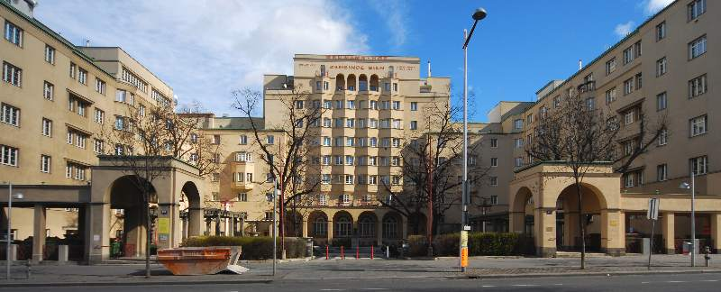 Der Reumanhof, ein Gemeindebau in Wien